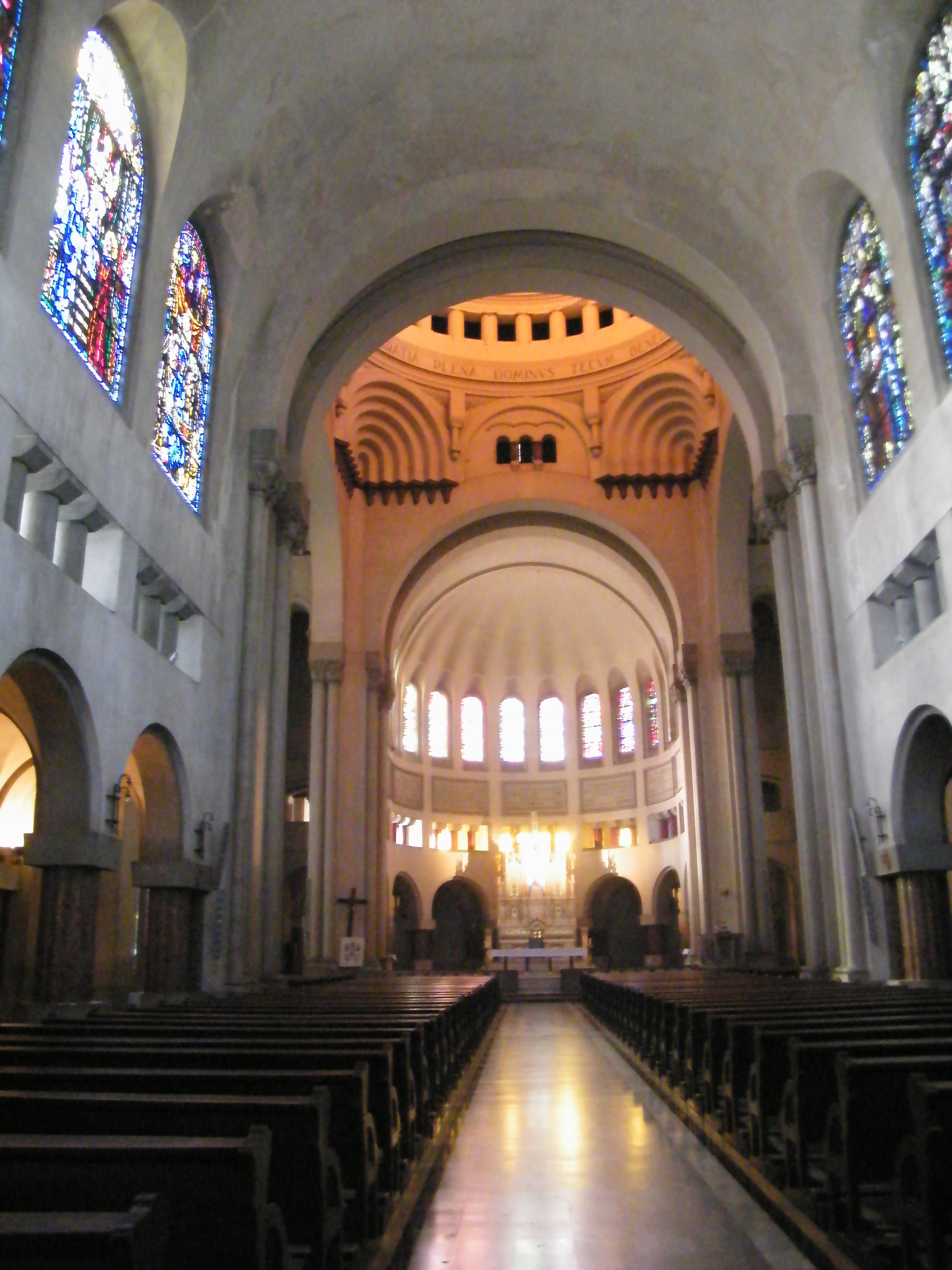 Imágenes del santuario de Lourdes (Chile), Basílica.